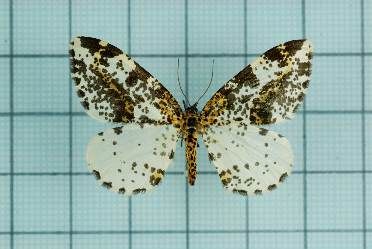 Abraxas wilemani Inoue, 1984 偉氏金線尺蛾 鞍1:P.21,Pl.3-15 female